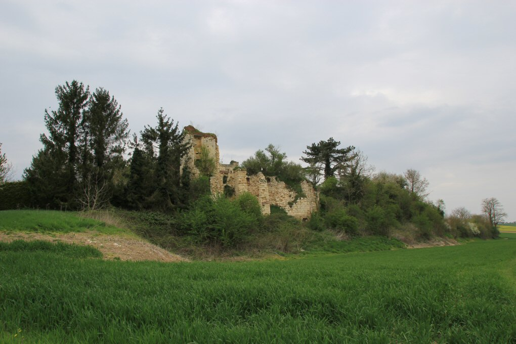 Château de Mailly-Raineval 2000 - Vue d'ensemble